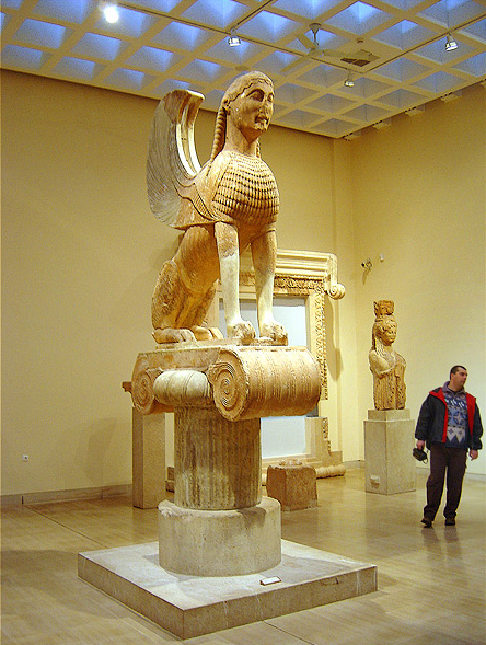 Esfinge no Museu Arqueológico de Delfos, Grécia.